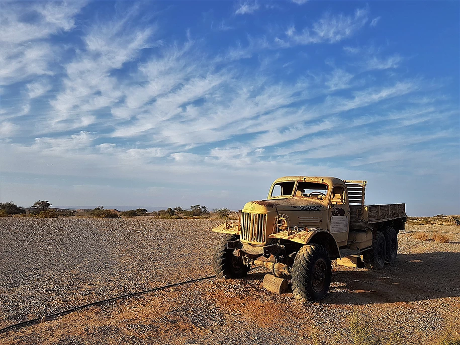 חניון הזיל